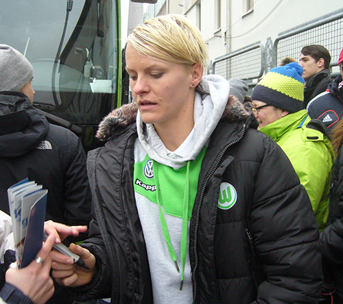 Nilla Fischer